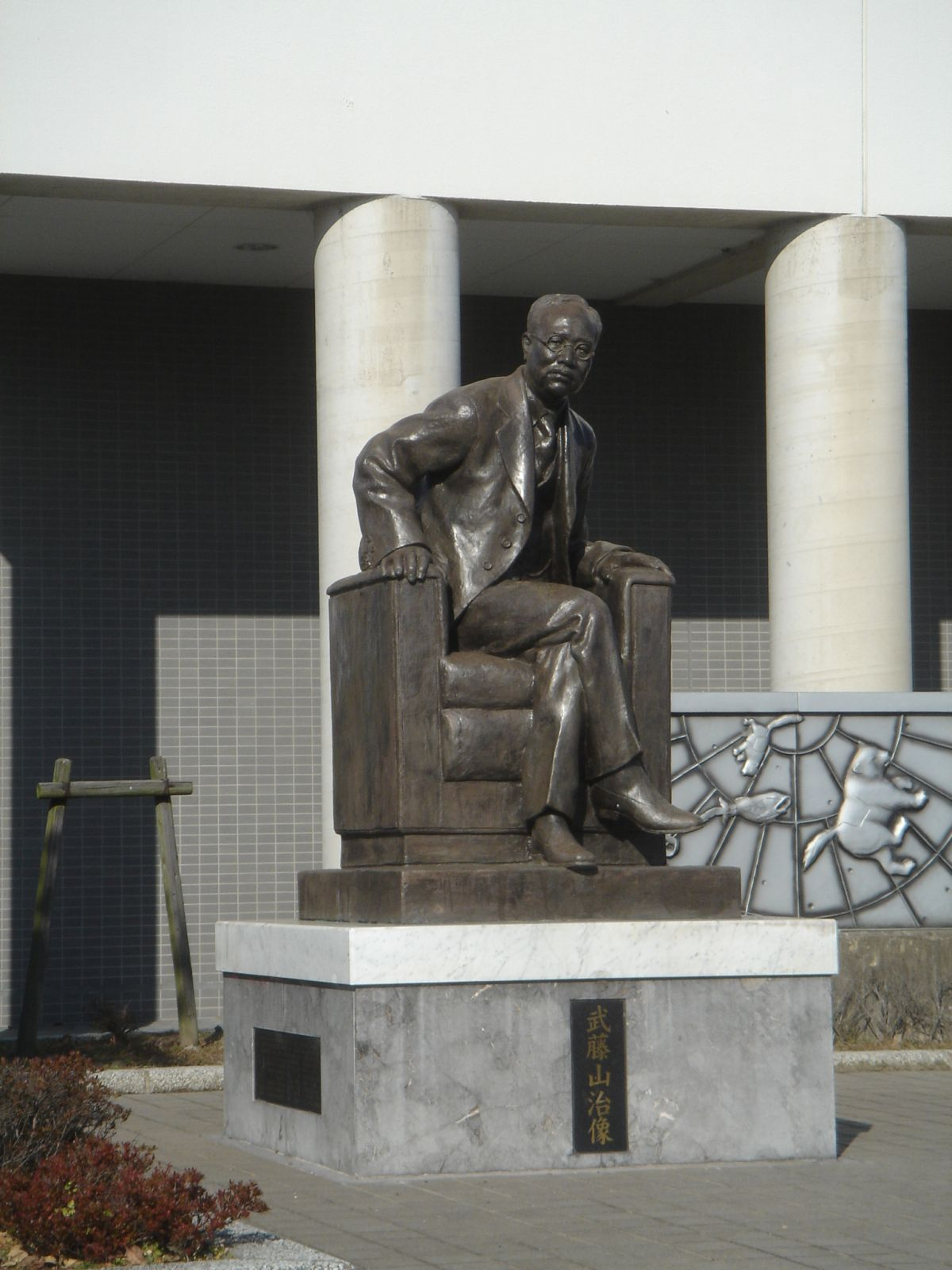 武藤山治、岐阜県海津市の生涯学習センター前で撮影